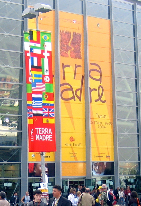 Salone del Gusto – Terra Madre 2006, Torino, Italia.